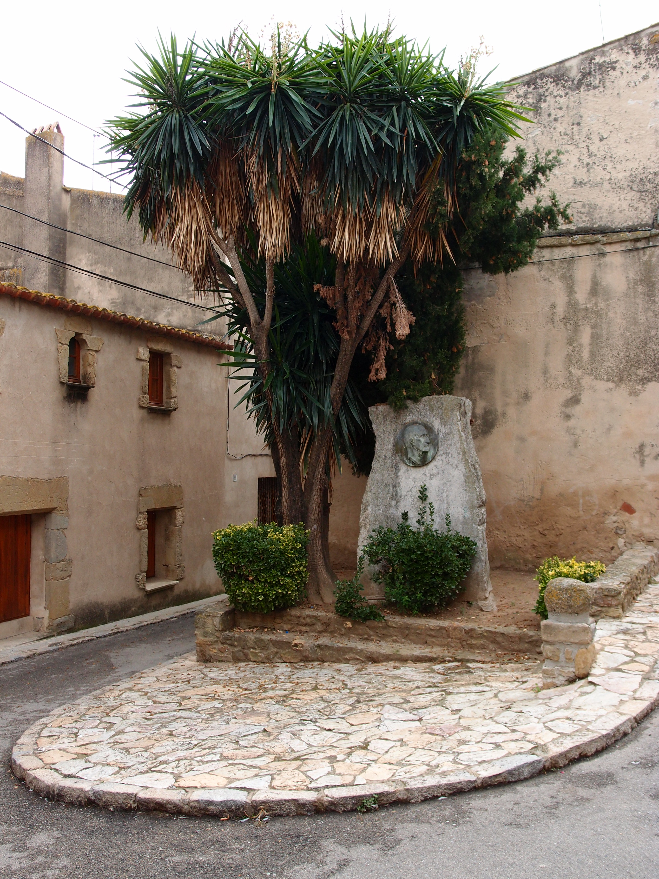 Verges (Cambó-Denkmal) - Katalonien/Spanien Datum: 24.09.2011 Urheber: M. Pfeiffer alias Gordito1869 Quelle: Privates Fotoarchiv des Urhebers